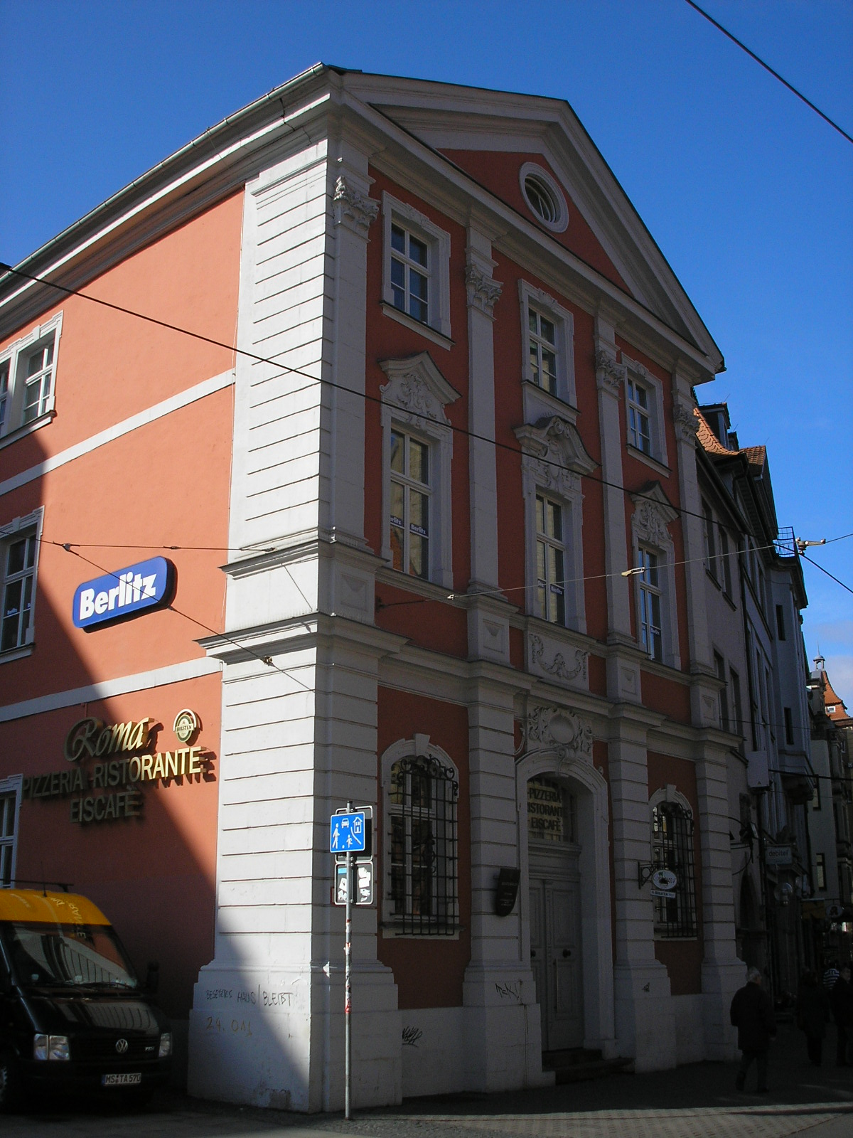 Die Fassade des ehemaligen Jesuitenkollegs in der Schlösserstraße in Erfurt (Thüringen).